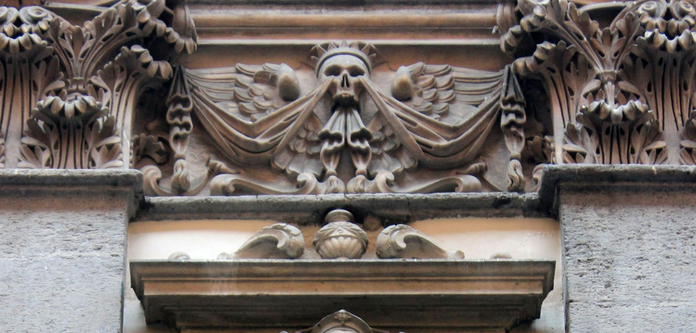 Nápoles. Purgatorio ad Arco. Fachada